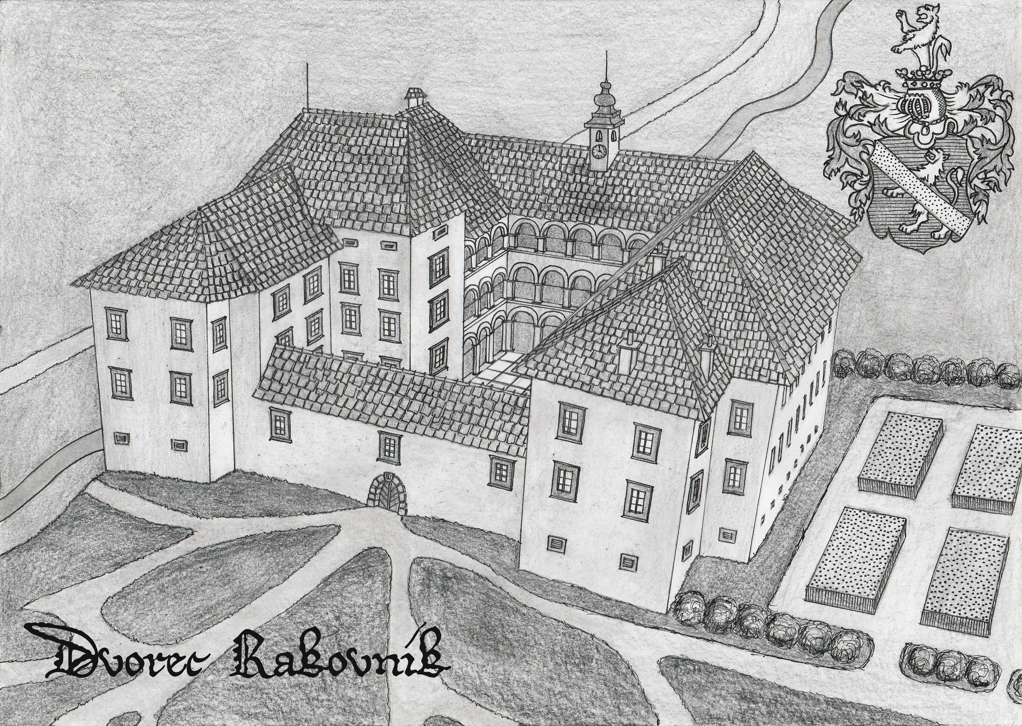 Poskus rekonstrukcije dvorca Rakovnik pri Šentrupertu. Grb plemiške družine Barbo.